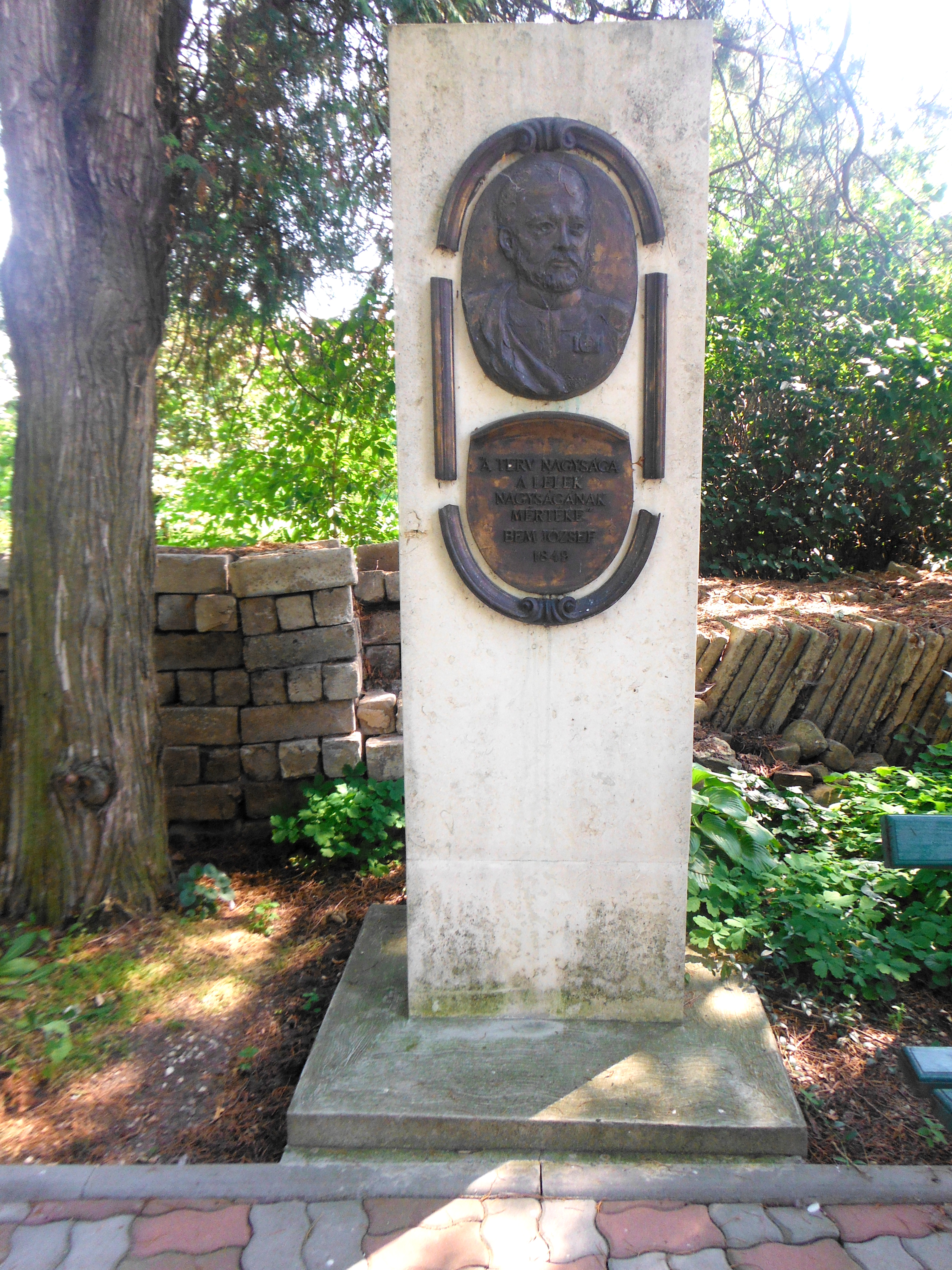 Denkmal für Bem in der Petöfi-Gedenkstätte von Albesti bei Sighisoara